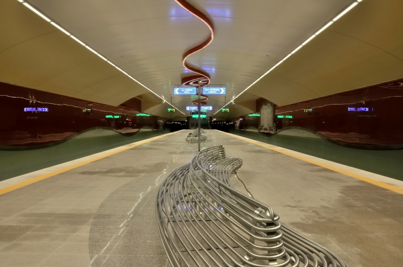 Метростанция "НДК"